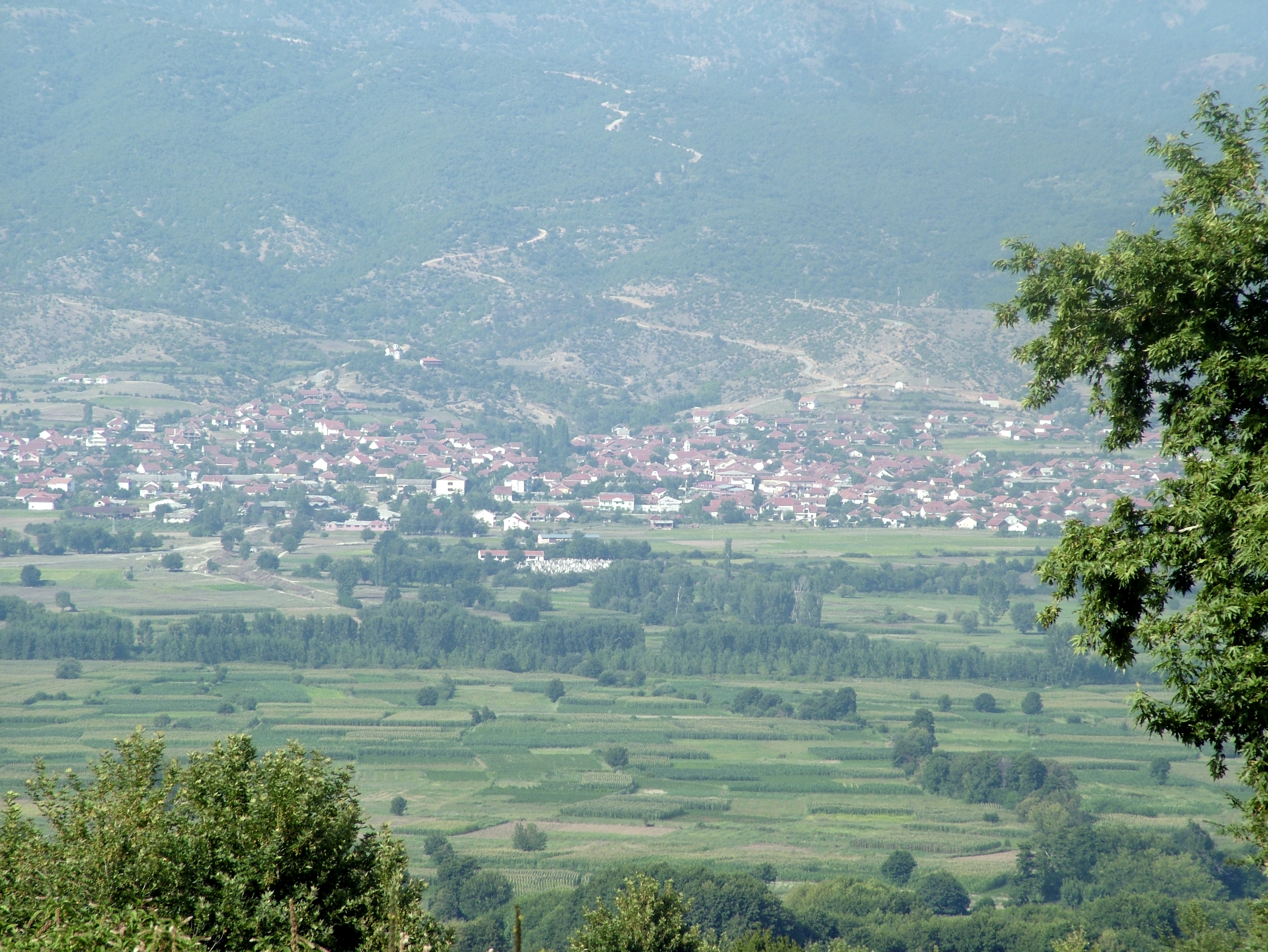 Струмишкото Ново село, община Ново село.